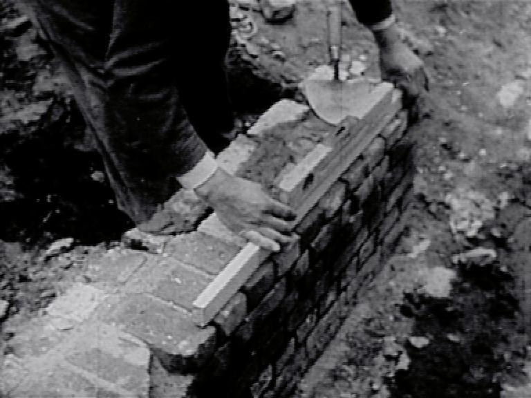 Présentation des outils employés pour la maçonnerie et le plâtrage. Comment faire un bon mortier. Construction d'un mur de clôture. Comment plâtrer. Petits travaux d'intérieur.